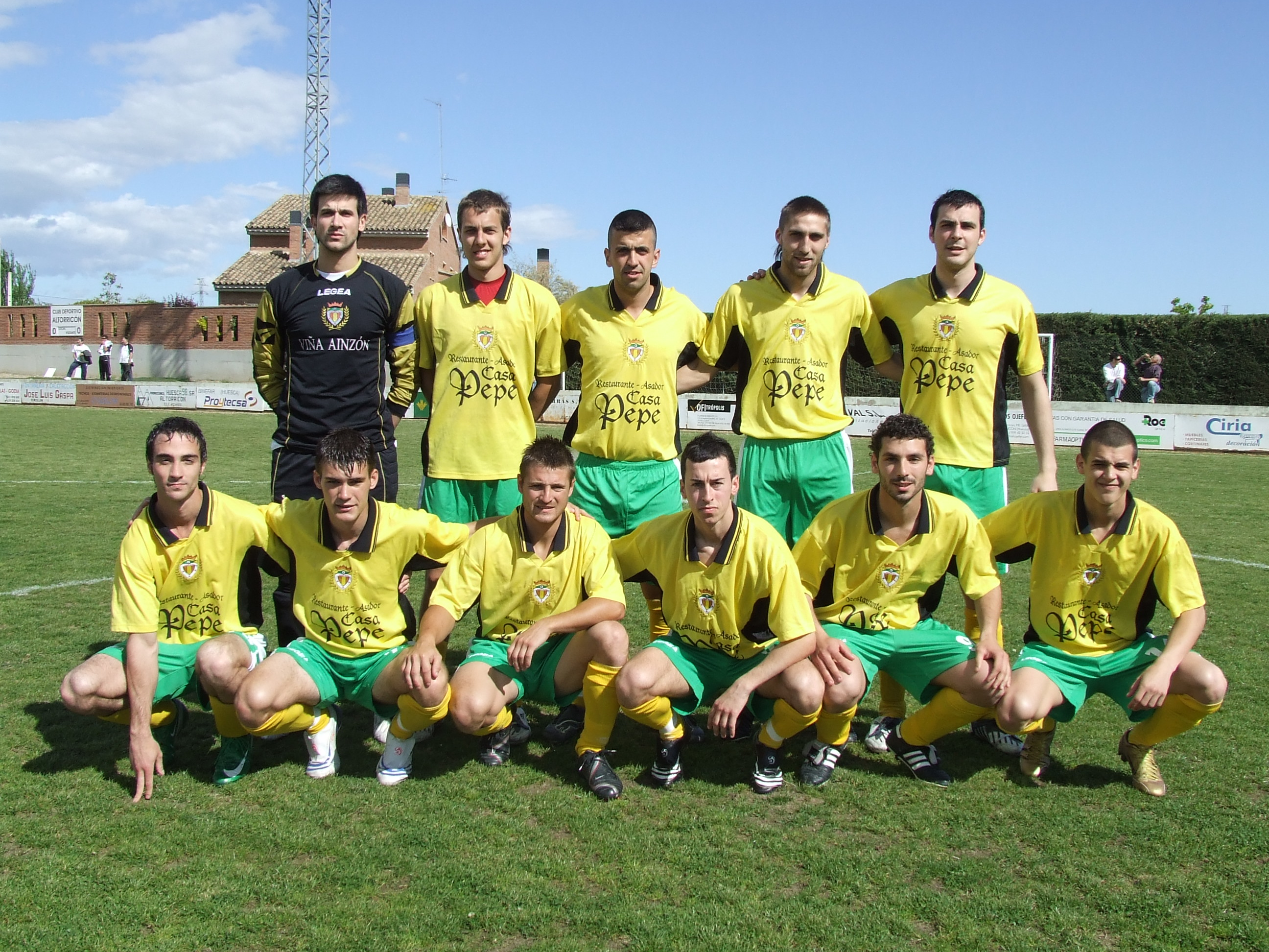 Altorricón 4 - Anento 4 (01.05.2009)